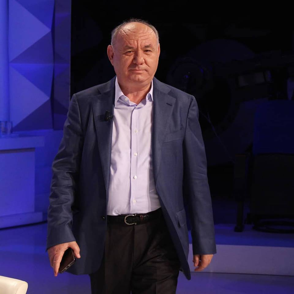 Shkrimtari, publicisti dhe gazetari i shquar Fahri Balliu